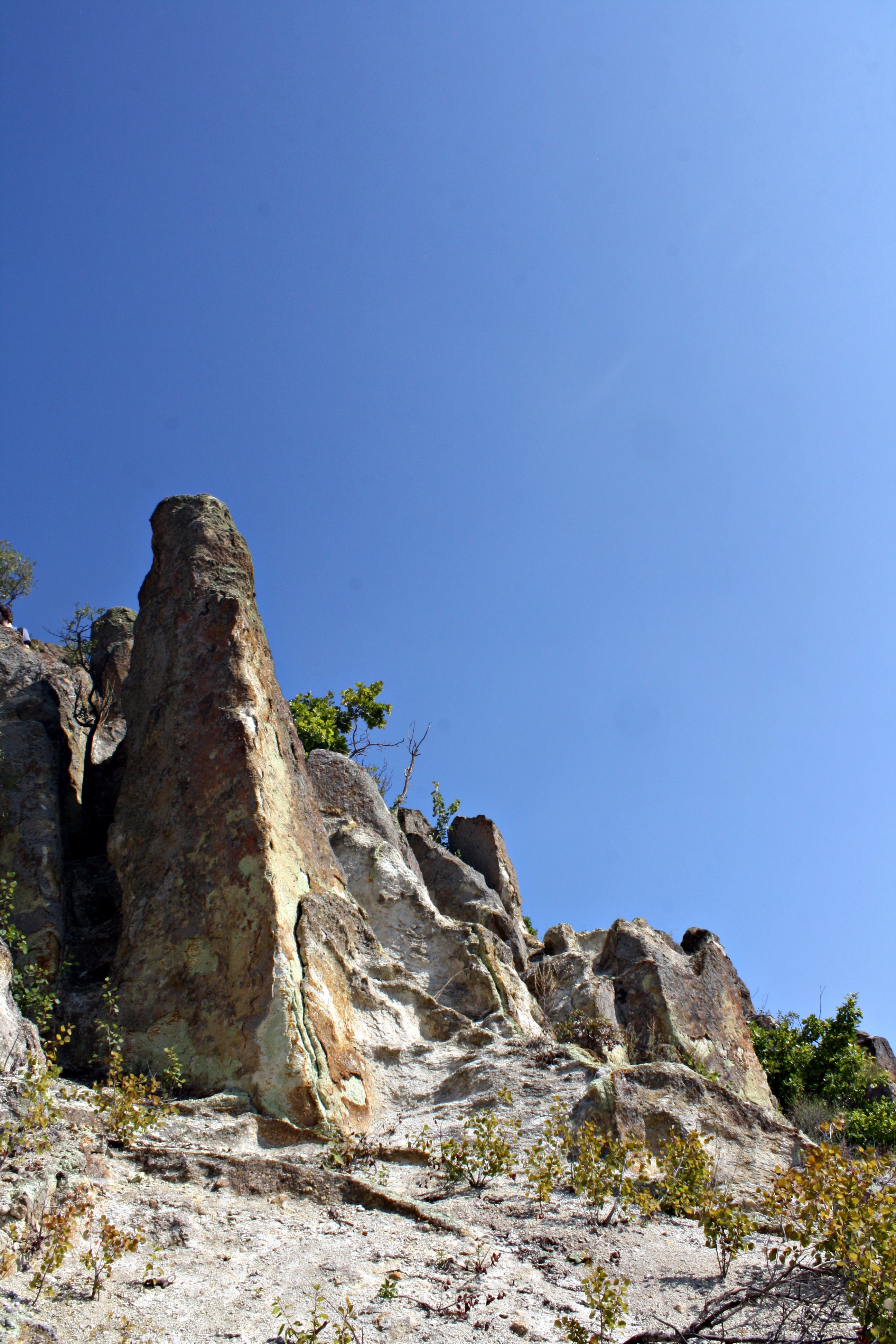 Fortesë Antikë , Gradina e Malokëve, (Ambienture)